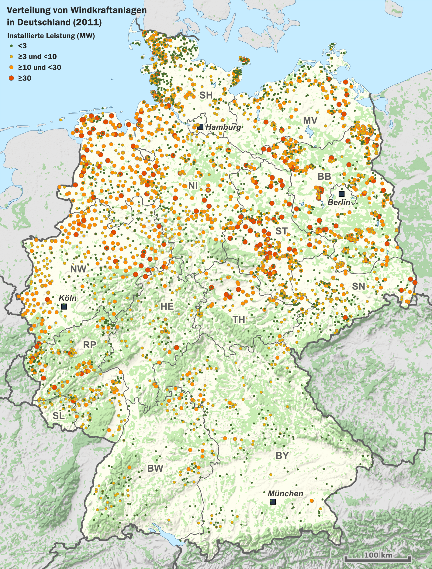 Karte der Verteilung von Windkraftanlagen (Windparks) in Deutschland 2011 Hinweise zur Datenverarbeitung: Die Anlagedaten wurden über ihre Orts-, Ortsteil und Postleitzahlen-Angaben geokodiert. Anlagen, die somit geografisch zusammenfallen, wurden in der Karte als ein Punkt dargestellt. Es handelt sich bei den Punkten also nicht unbedingt um Windparks mit einem betrieblichen Zusammenhang, sondern lediglich mit einem räumlichen Zusammenhang. Als Datengrundlage wurden die Meldungen der Anlagestammdaten der Übertragungsnetzbetreiber verwendet. Es wurden nur Anlagen in die Darstellung einbezogen, deren Inbetriebnahme vor dem 1.1.2012 lag. Kartenprojektion: ETRS-LCC (Lambert Conformal Conic) This map was created with GeoTools.